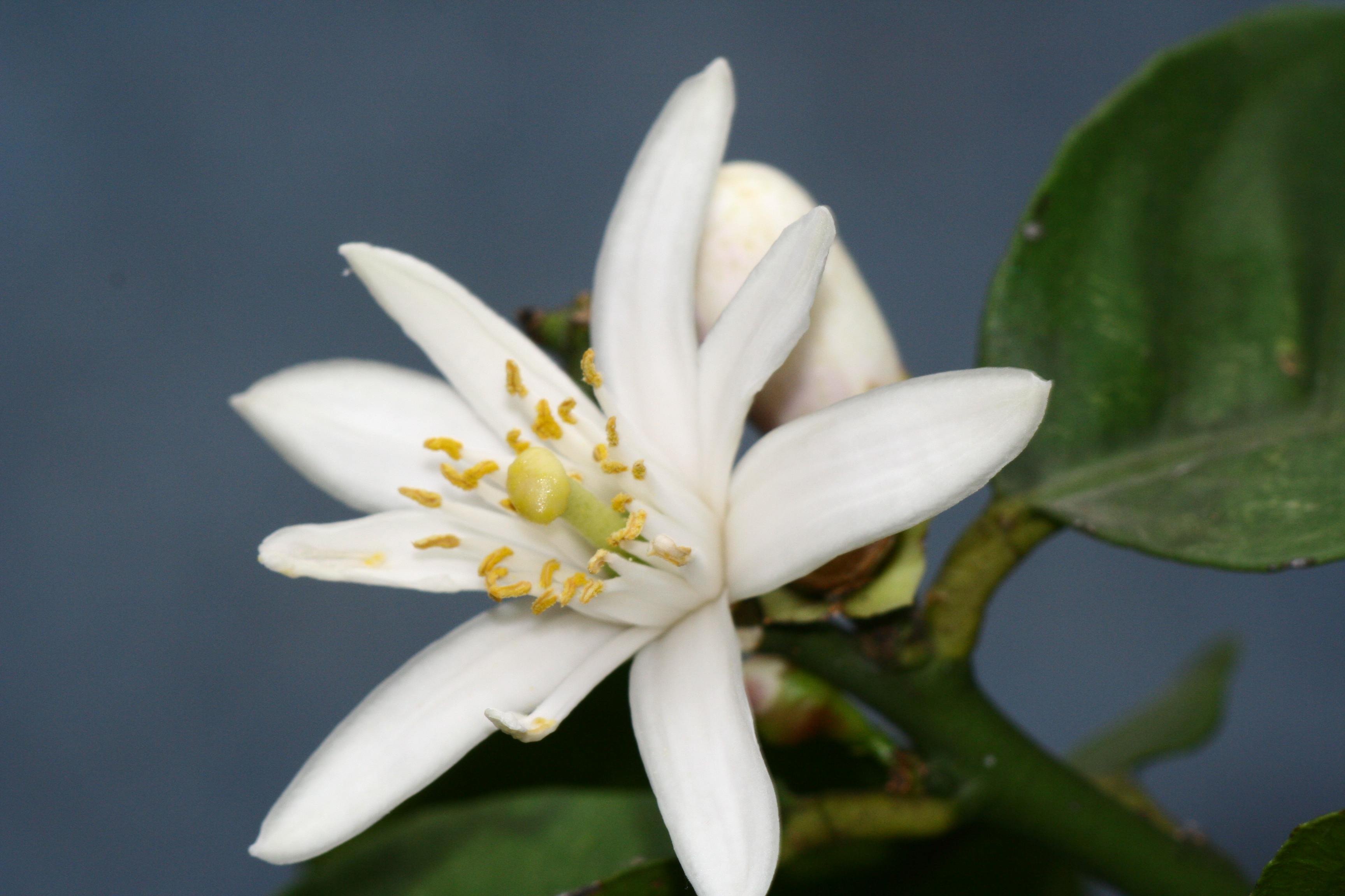 die Blüte eines Zitronenbaums